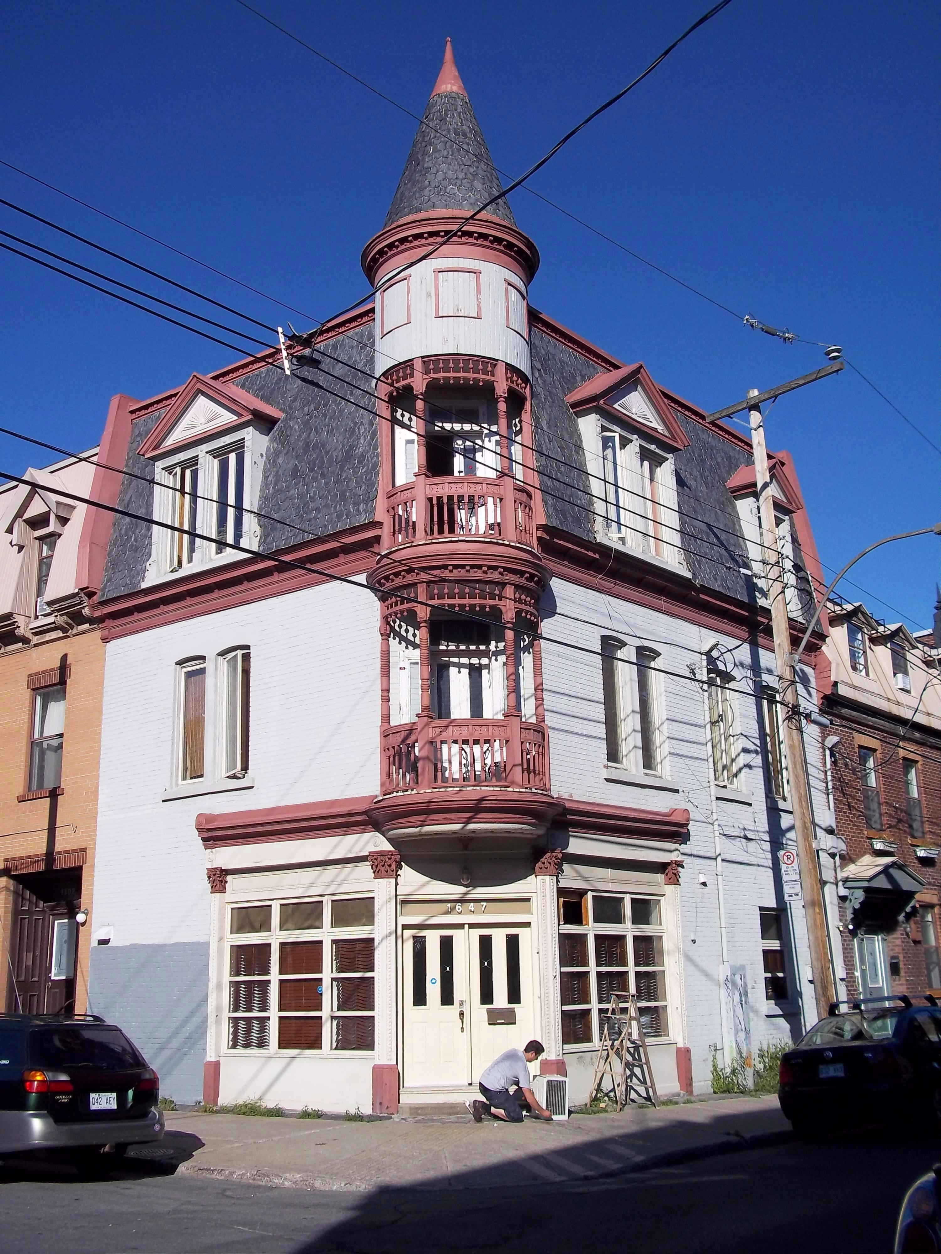 Maison L'Archevêque, rue de la Visitation, Montreal info